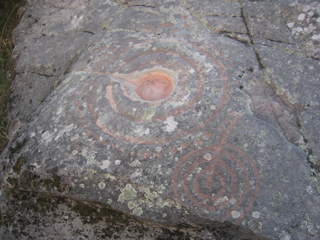 Laxe das Rodas en Louro, Muros